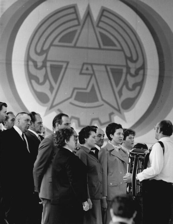 Kulturfestspiele, Gesangswettbewerb Zentralbild Gahlbeck 1-6-71 Bez. Leipzig: Arbeiterfestspiele - 2. Kulturfeststage auf dem Lande - Der Chor der LPG Luppa zeigte sein Können bei ökonomisch-kulturellen Leistungsvergleich, einem Höhepunkt der 2. Kulturfestspiele auf dem Lande. Bei diesem Vergleich wetteiferten Genossenschaftsbauern der LPG Dahlen, Luppa und Börln um die besten Ergebnisse. Dazu entstanden neue Chöre, Kabarettgruppen und Tanzzirkel.